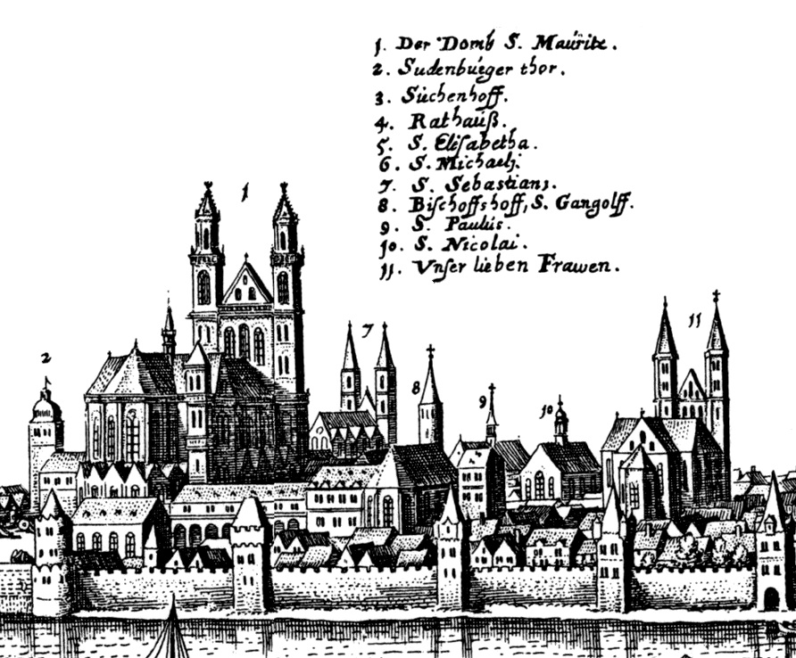 Matthäus Merian: Magdeburg, Topographia Saxoniae Inferioris, gedruckt 1653; das Bild zeigt offensichtlich das Stadtbild vor der Zerstörung Magdeburgs 1631.